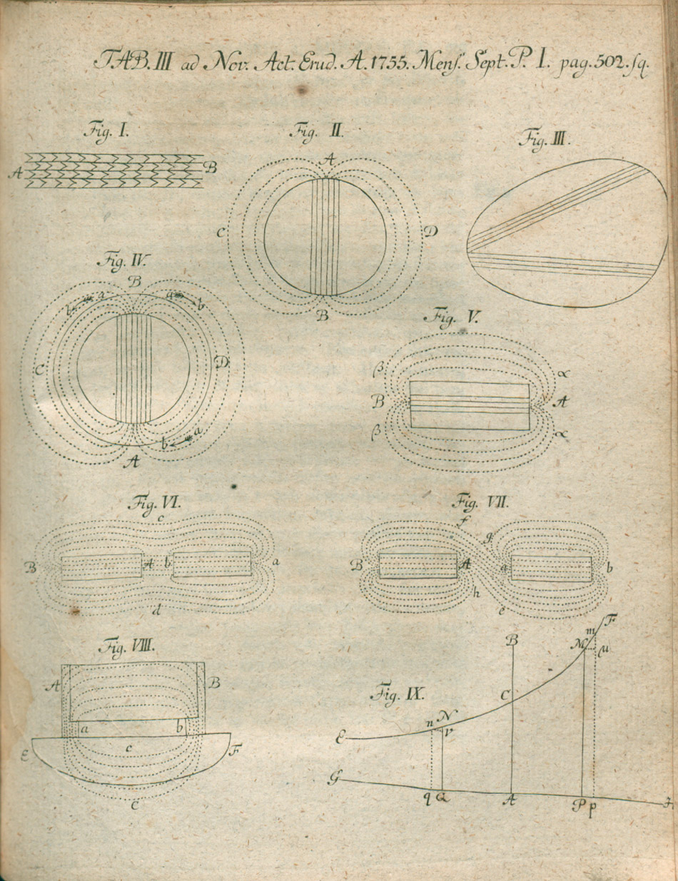 Illustration